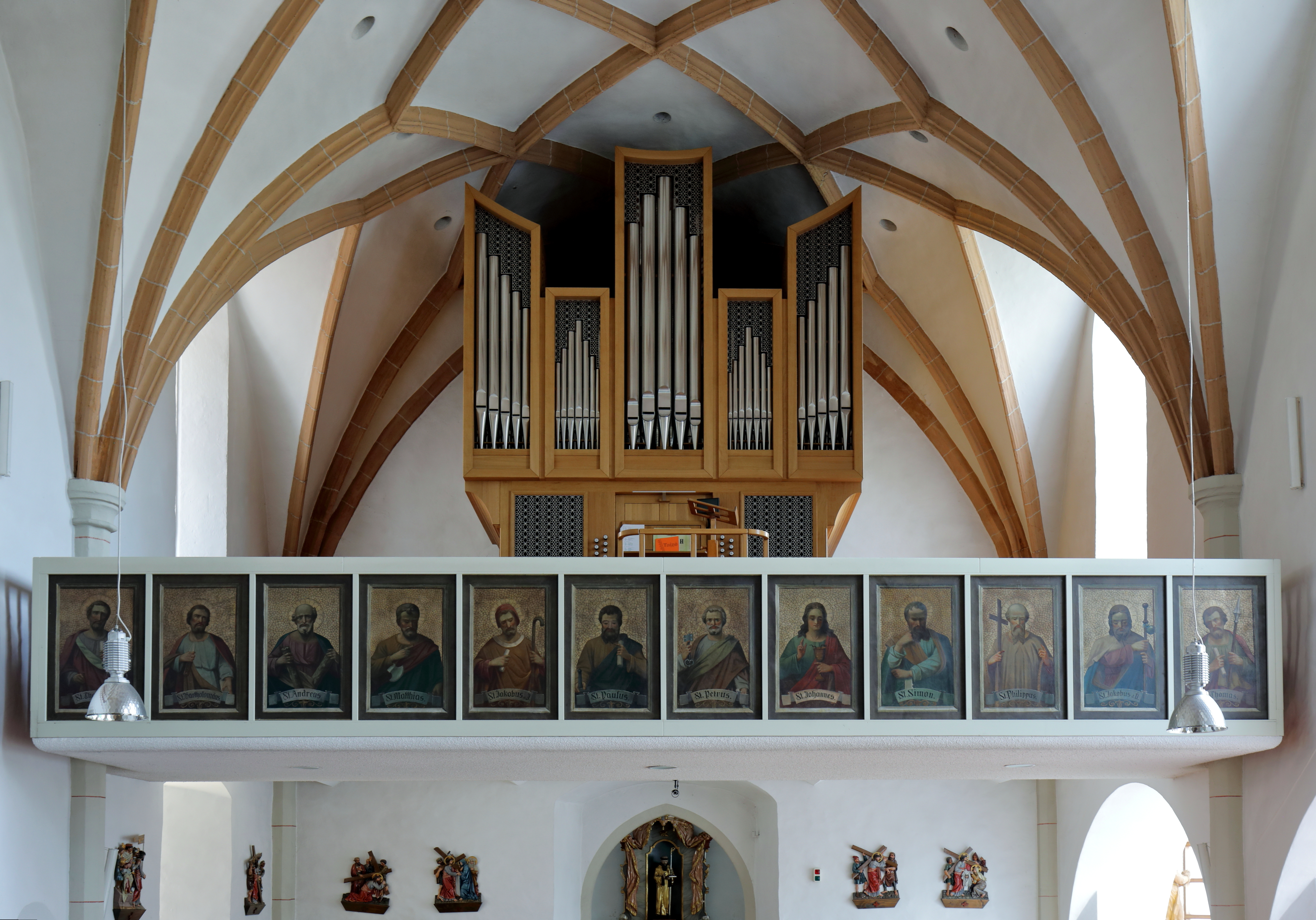 Die Orgelempore der röm.-kath. Pfarrkirche Hl. Jakobus der Ältere in der oberösterreichischen Marktgemeinde Seewalchen am Attersee.Die Bildnisse der zwölf Apostel an der Empore wurden 1913 angebracht. Die Orgel mit 26 Register aus dem Jahr 2012 schuf Orgelbau Pirchner und wurde am 16.6.2013 geweiht.